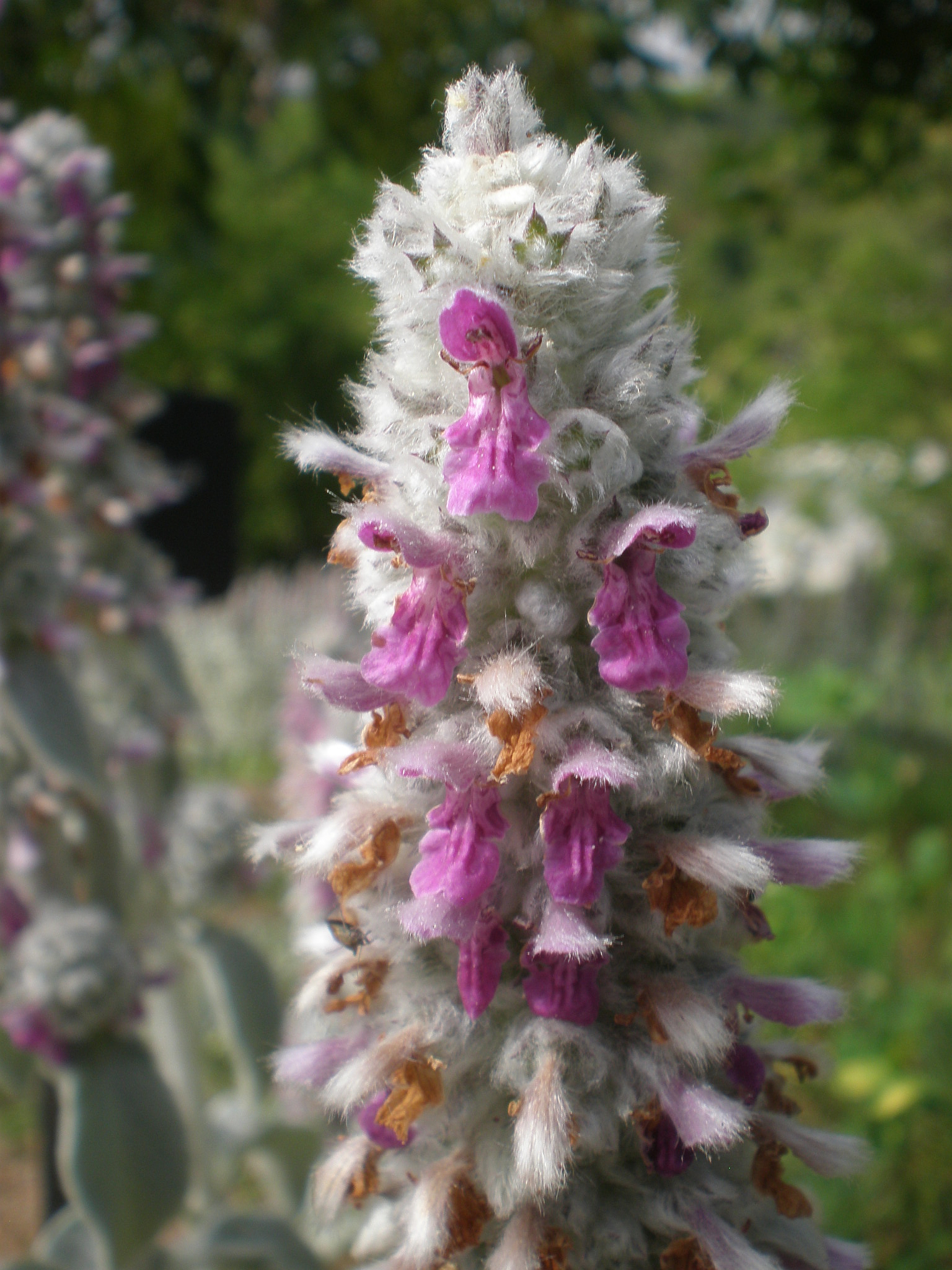 Jardín Botánico de Barcelona.